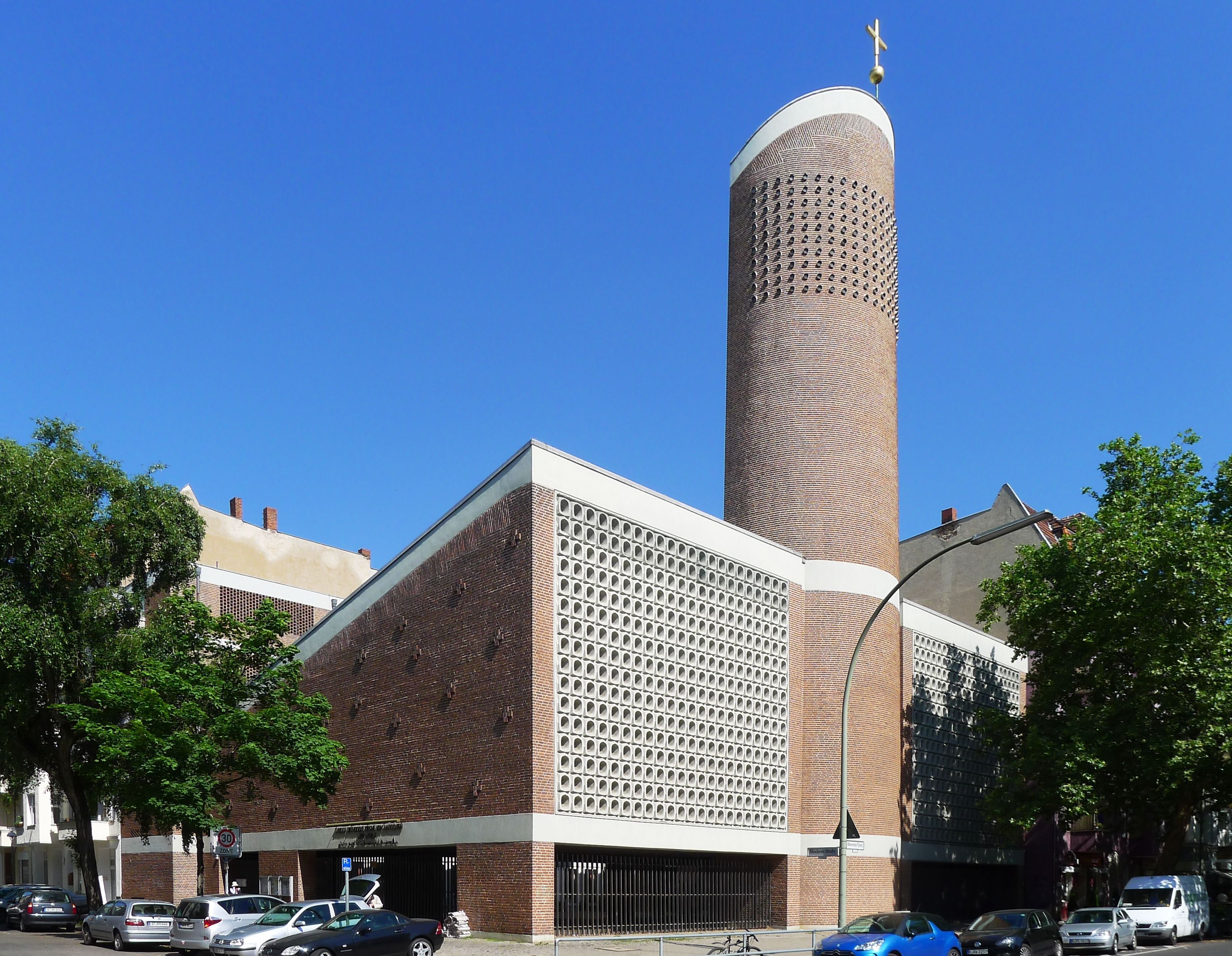 Blick auf die Mor Afrem-Kirche, die ehemalige katholische Mariä-Himmelfahrt-Kirche